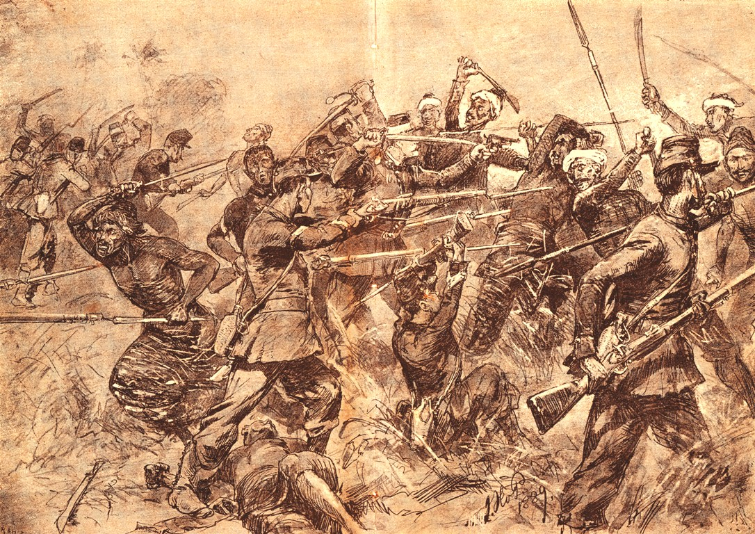 Strijd om de Mesigit